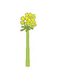 Morfología de la inflorescencia. Glomérulo. Según Simpson (2005), Plant Systematics.